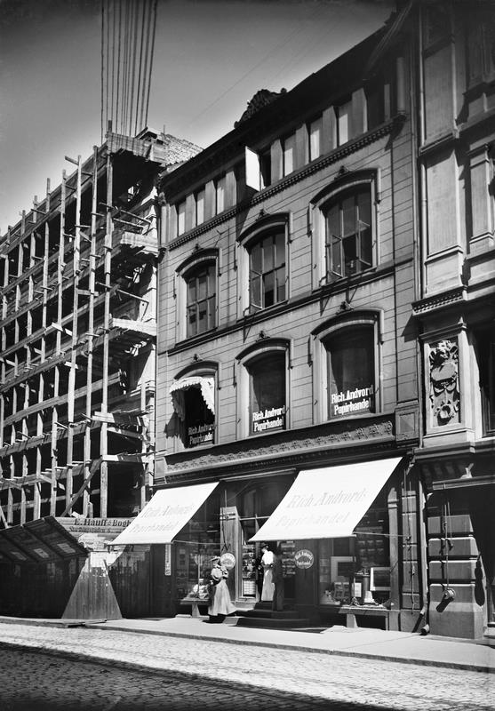 Rich Andvord papirforretning, forretningsgård, markiser, byggevirksomhet, mennesker.